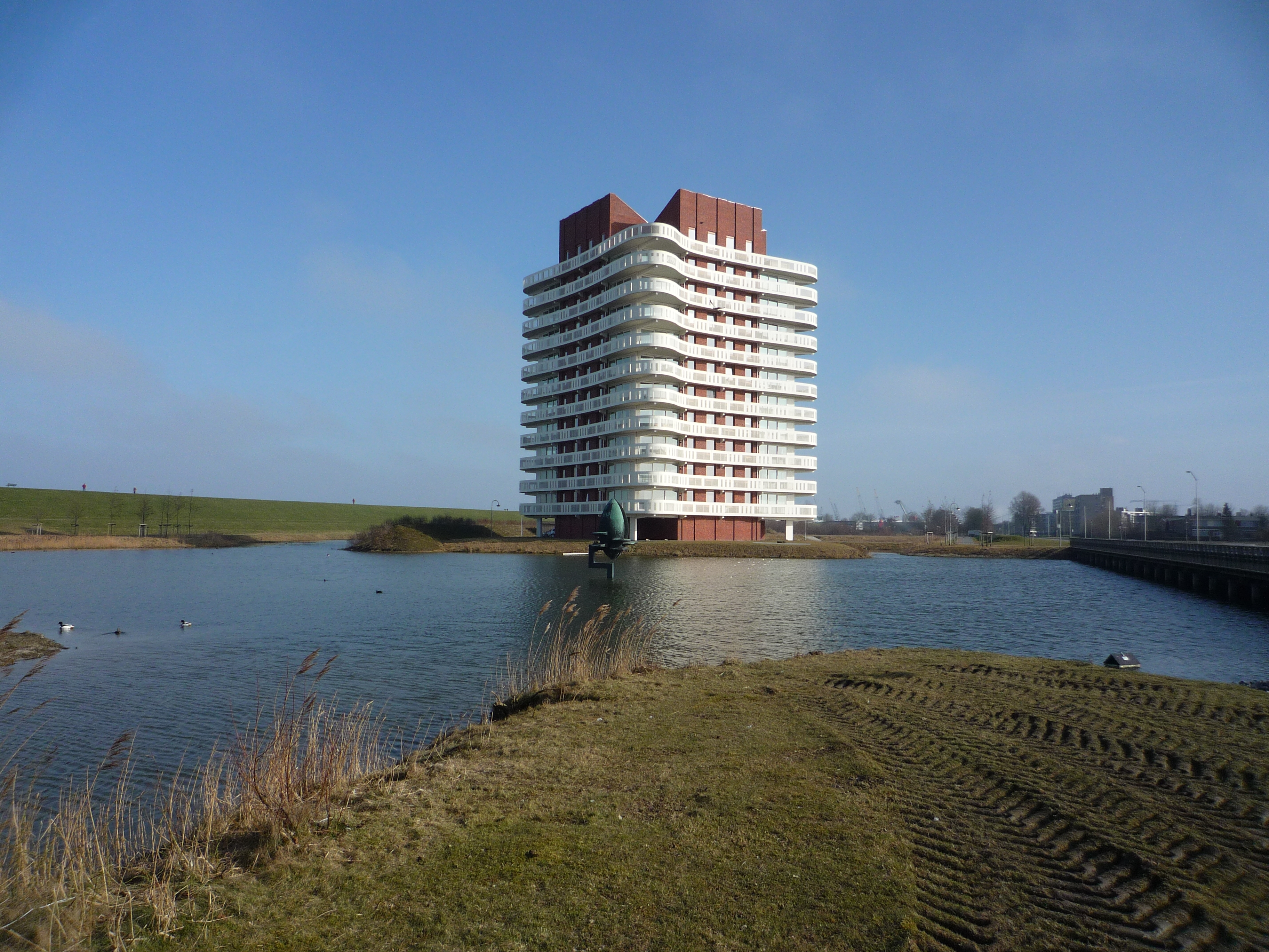 20110304 03 Delfzijl